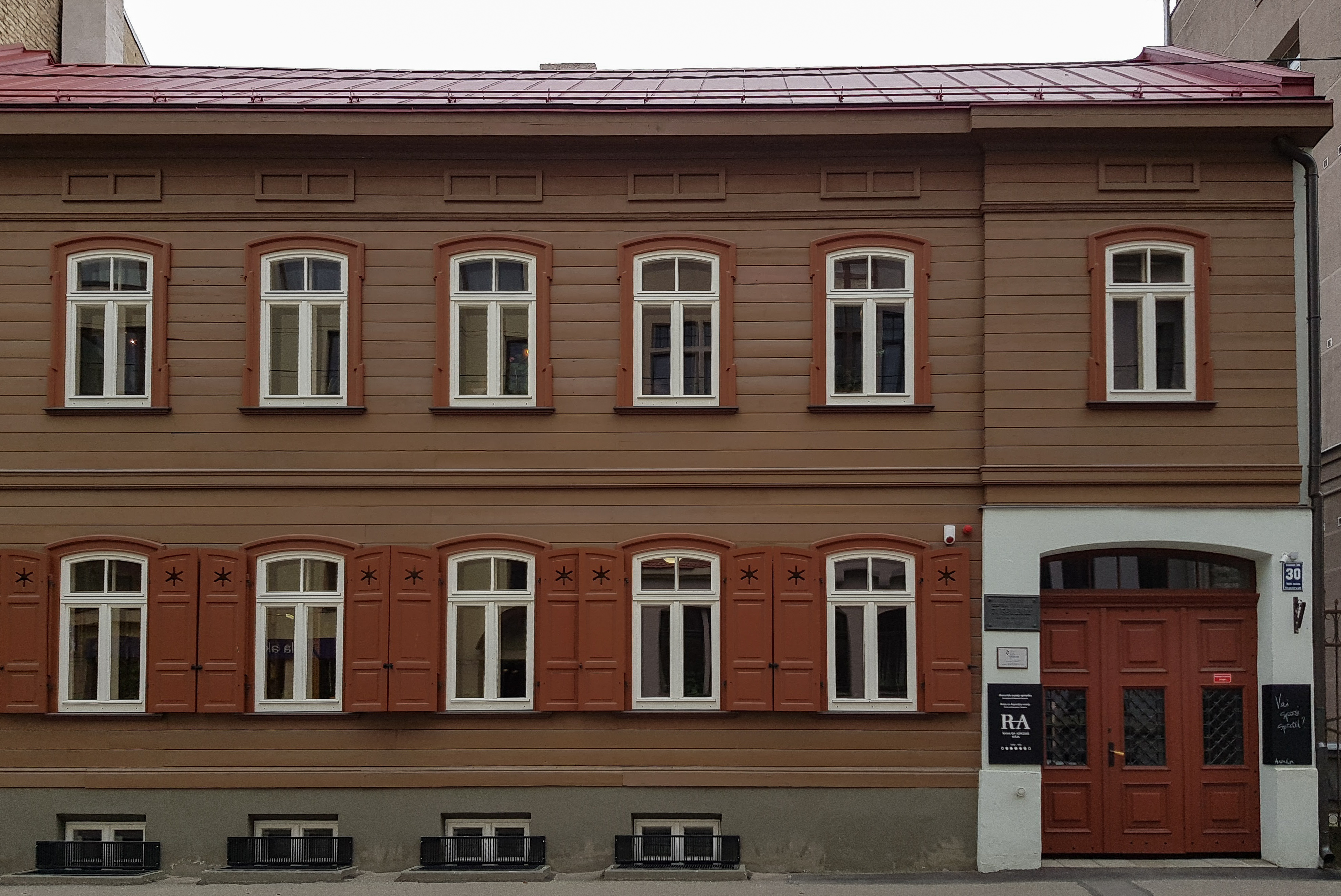 Raiņa un Aspazijas māja, Rīga, Baznīcas iela 30